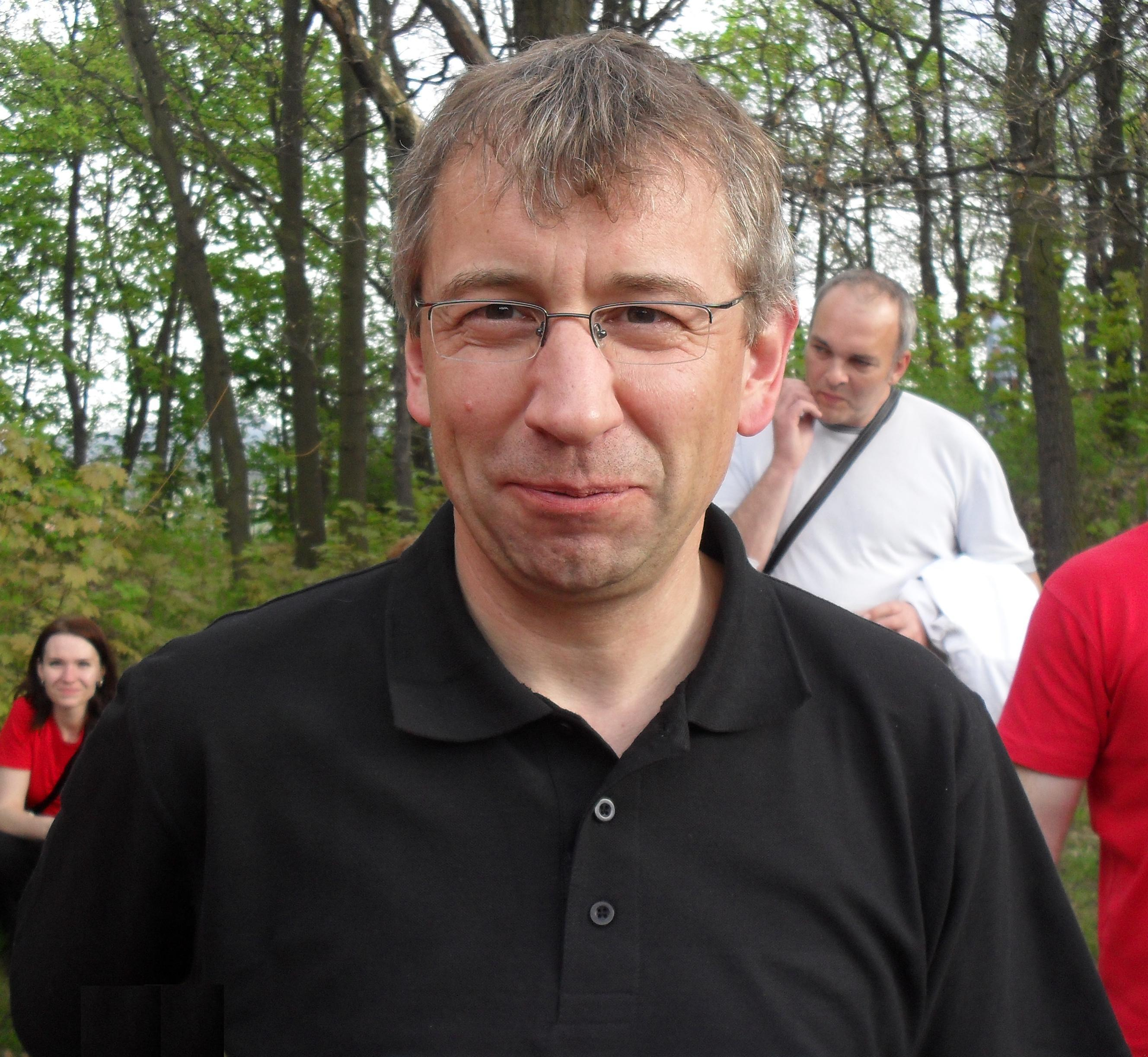 Jaromír Drábek, kandidát strany Top09, na předvolební propagační akci během "Pálení čarodějnic" v Teplicích, na Písečném vrchu. Čepoval zde osobně lidem pivo.